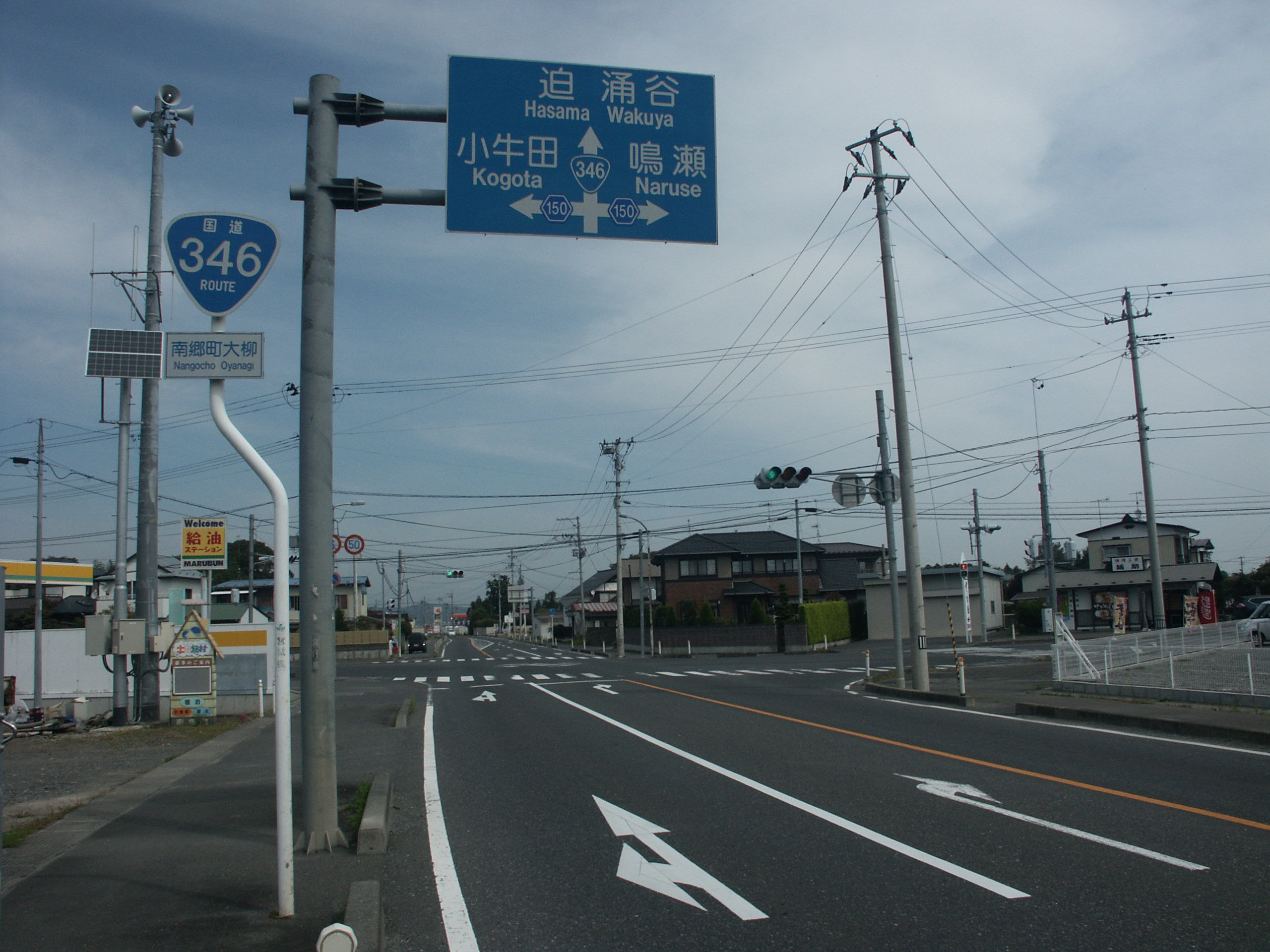 国道346号線宮城県美里町大柳付近(涌谷方面を撮影）